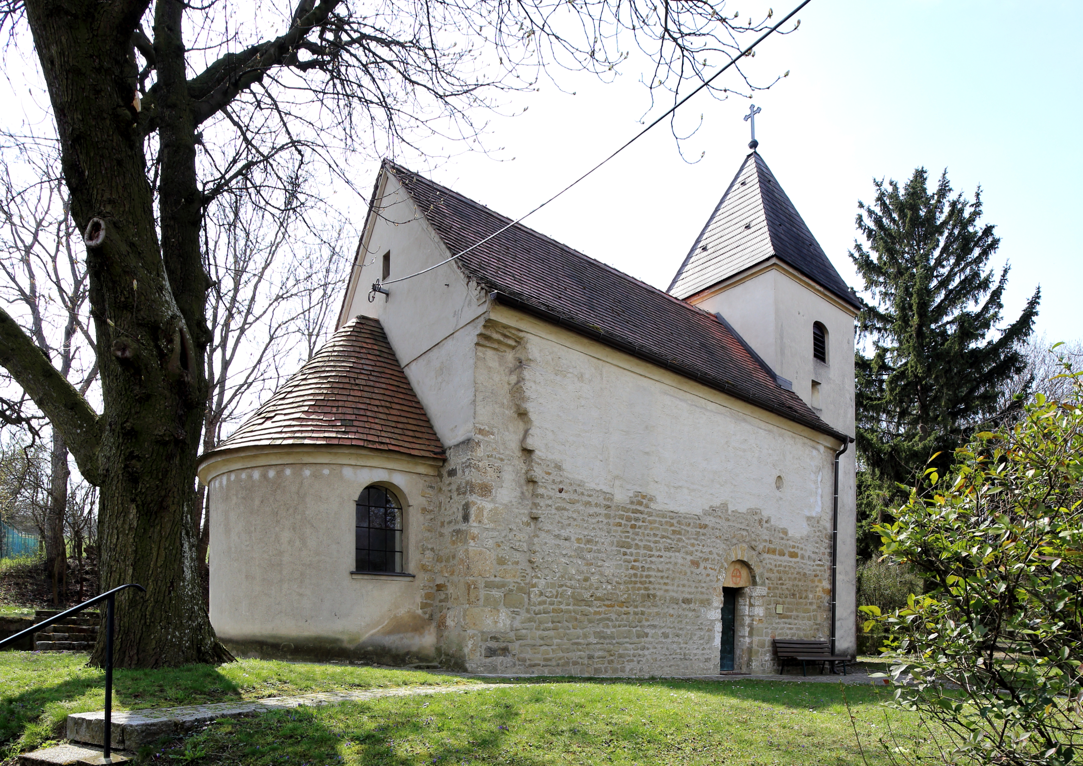 Nordostansicht der katholischen Filialkirche hl. Maria Magdalena in Königsbrunn, ein Ortsteil der niederösterreichischen Marktgemeinde Enzersfeld im Weinviertel. Die romanische Saalkirche aus dem 12./13. Jahrhundert wurde im Zuge des II. Weltkrieges stark beschädigt und von 1953 bis 1956 wiederaufgebaut (großteils rekonstruiert).